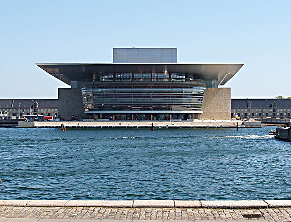 Copenhagen Opera 2004. Architect: Henning Larsen